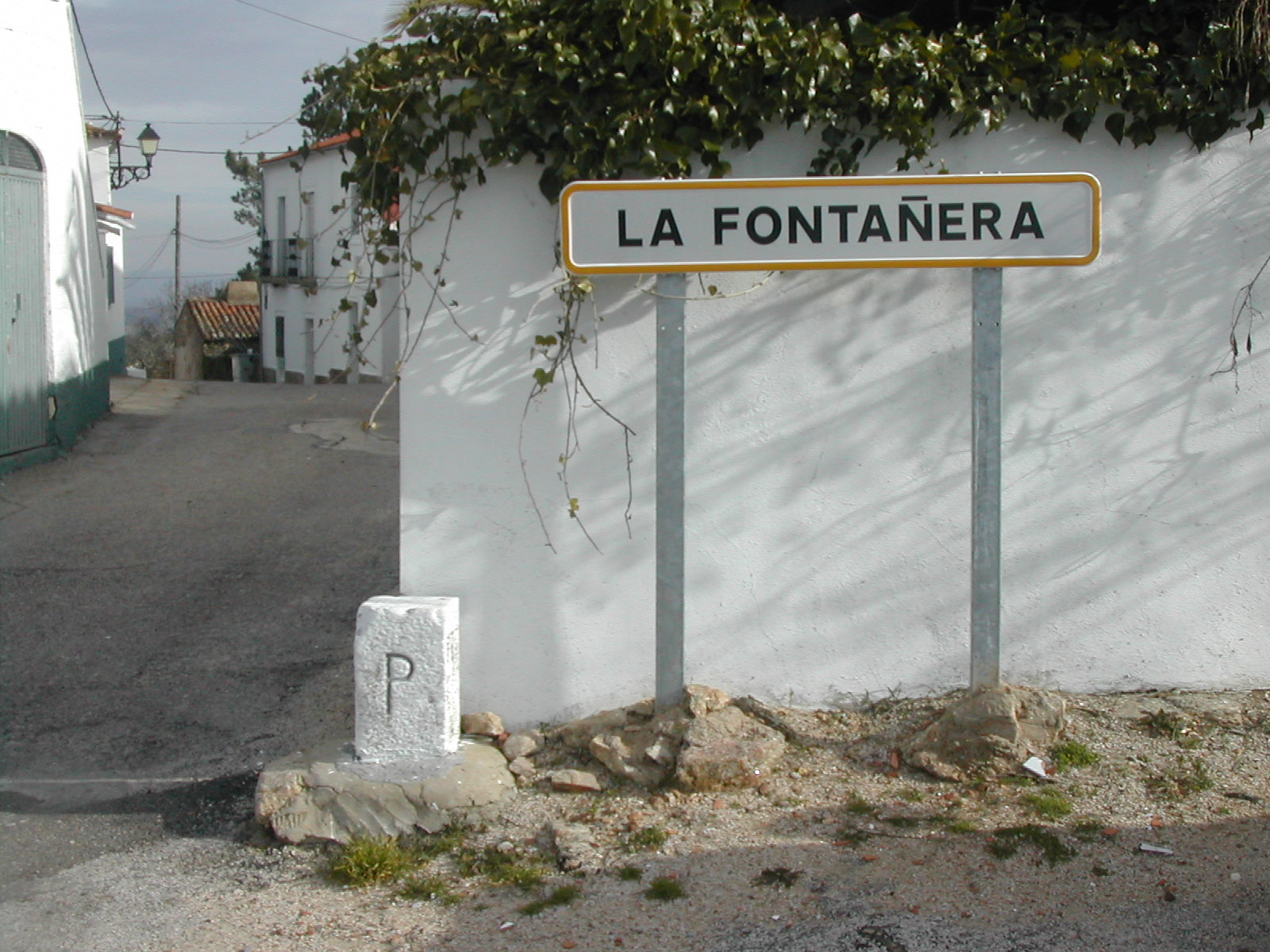 Povoação de La Fontañera construída no limite da fronteira portuguesa